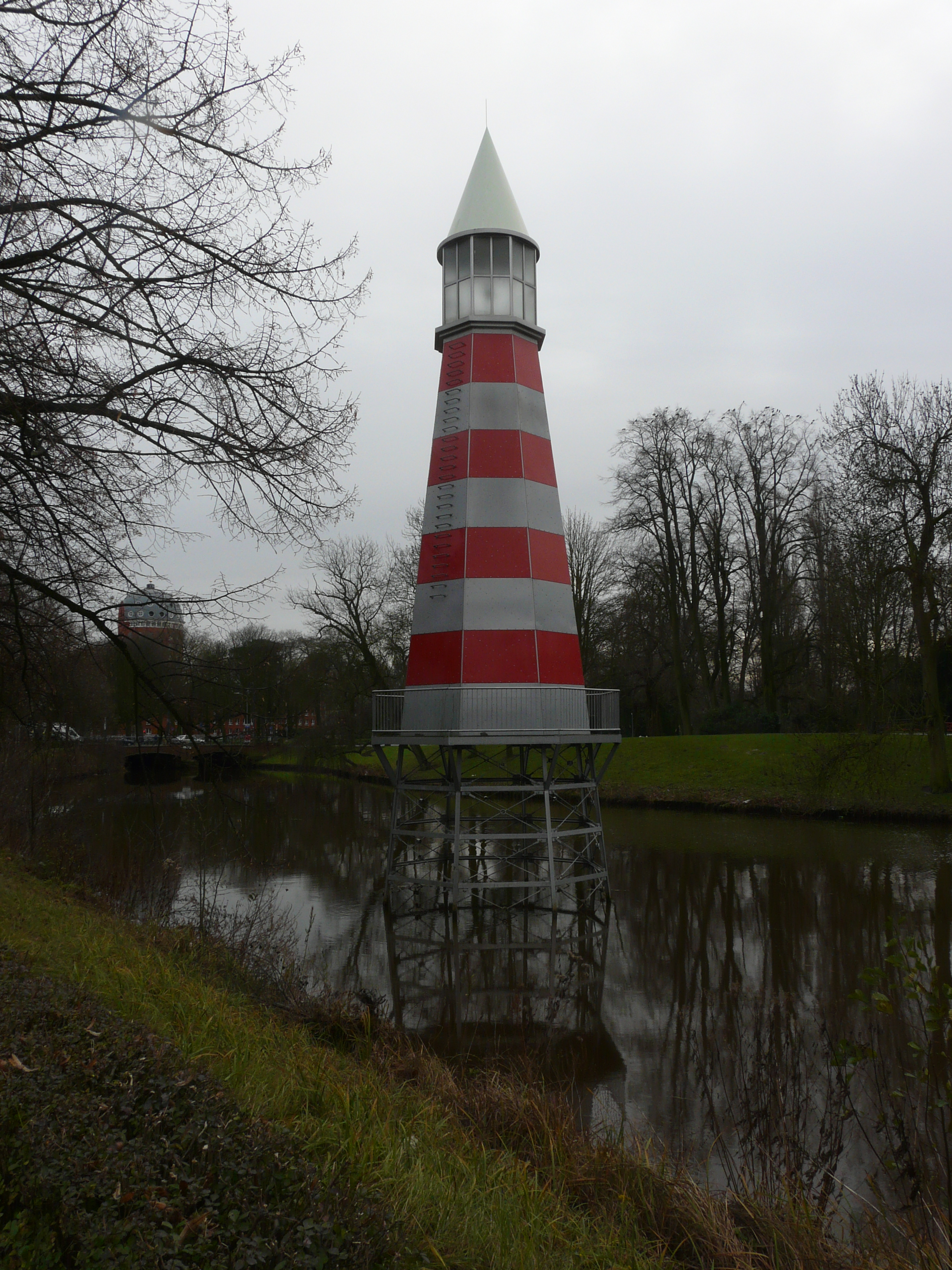 Zicht op de vuurtoren van de kunstenaar Aldo Rossi in de Academiesingel gelegen nabij het Station Breda en het Park Valkenberg in het centrum van Breda